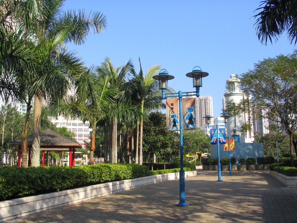 寶康公園 Po Hong Park